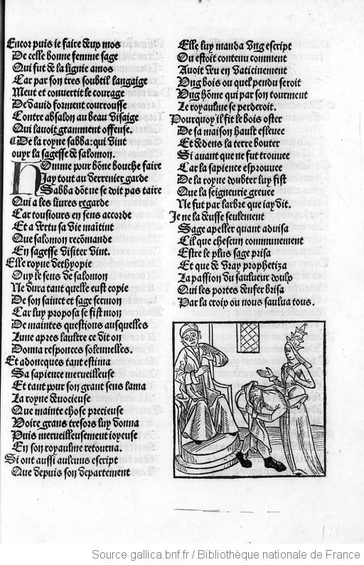 [Illustrations de La Champion des dames] / [Non identifié] ; Martin France, aut. du texte, France, Martin. Auteur du texte, 1488